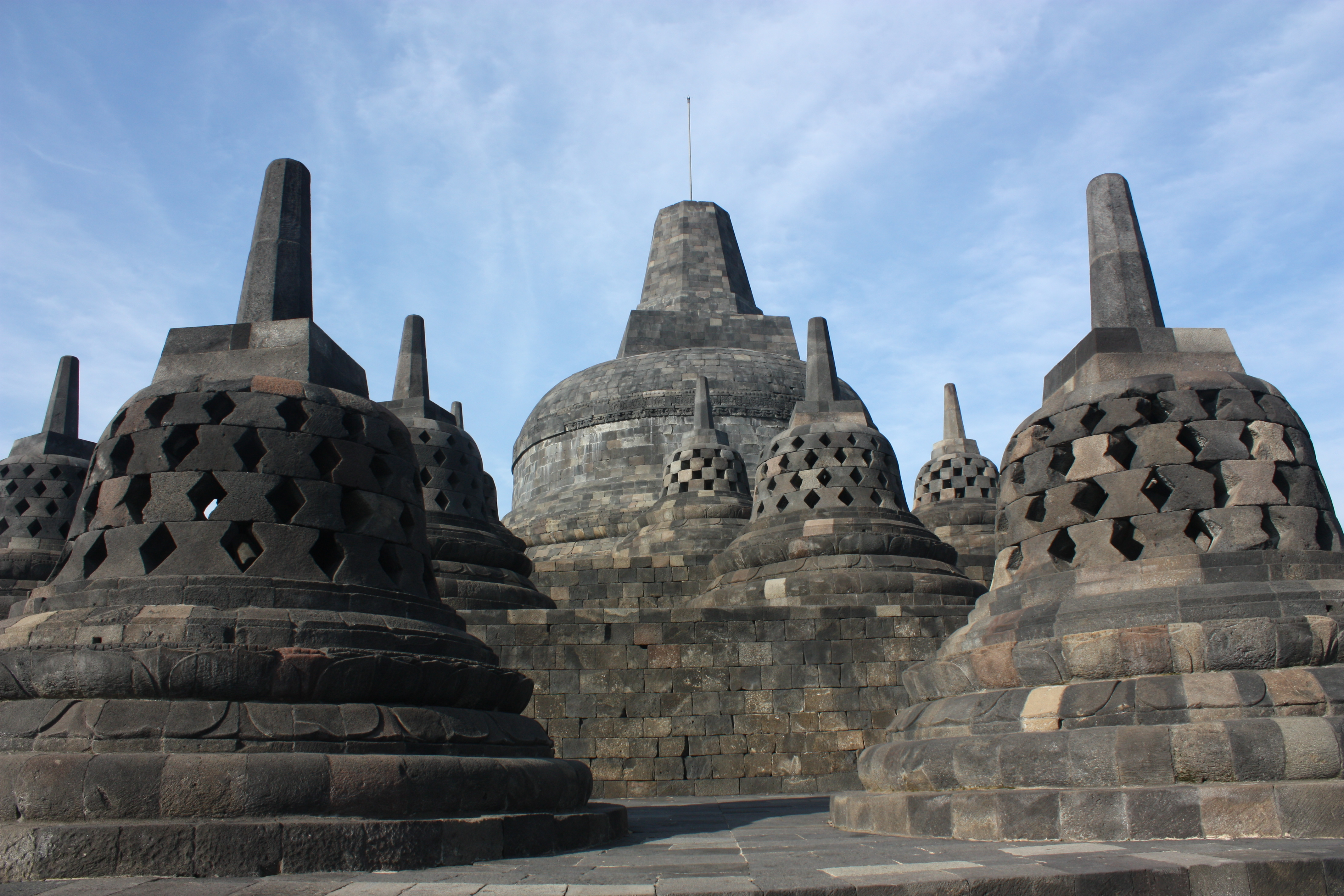 Borobudur